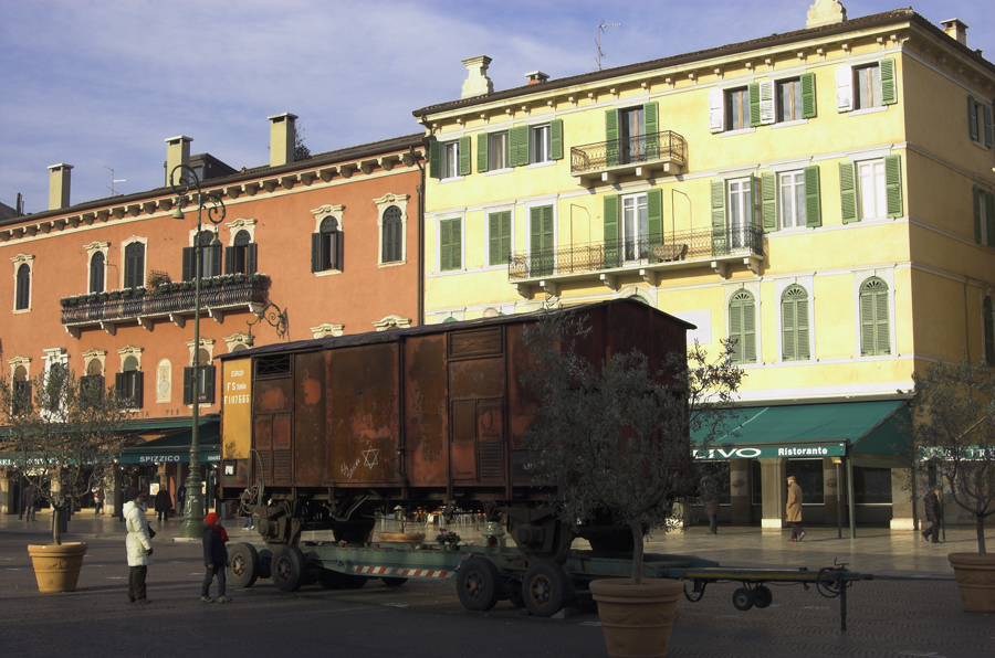 Vagone ferroviario utilizzato per il trasporto degli ebrei verso i campi di sterminio in piazza Bra a Verona.